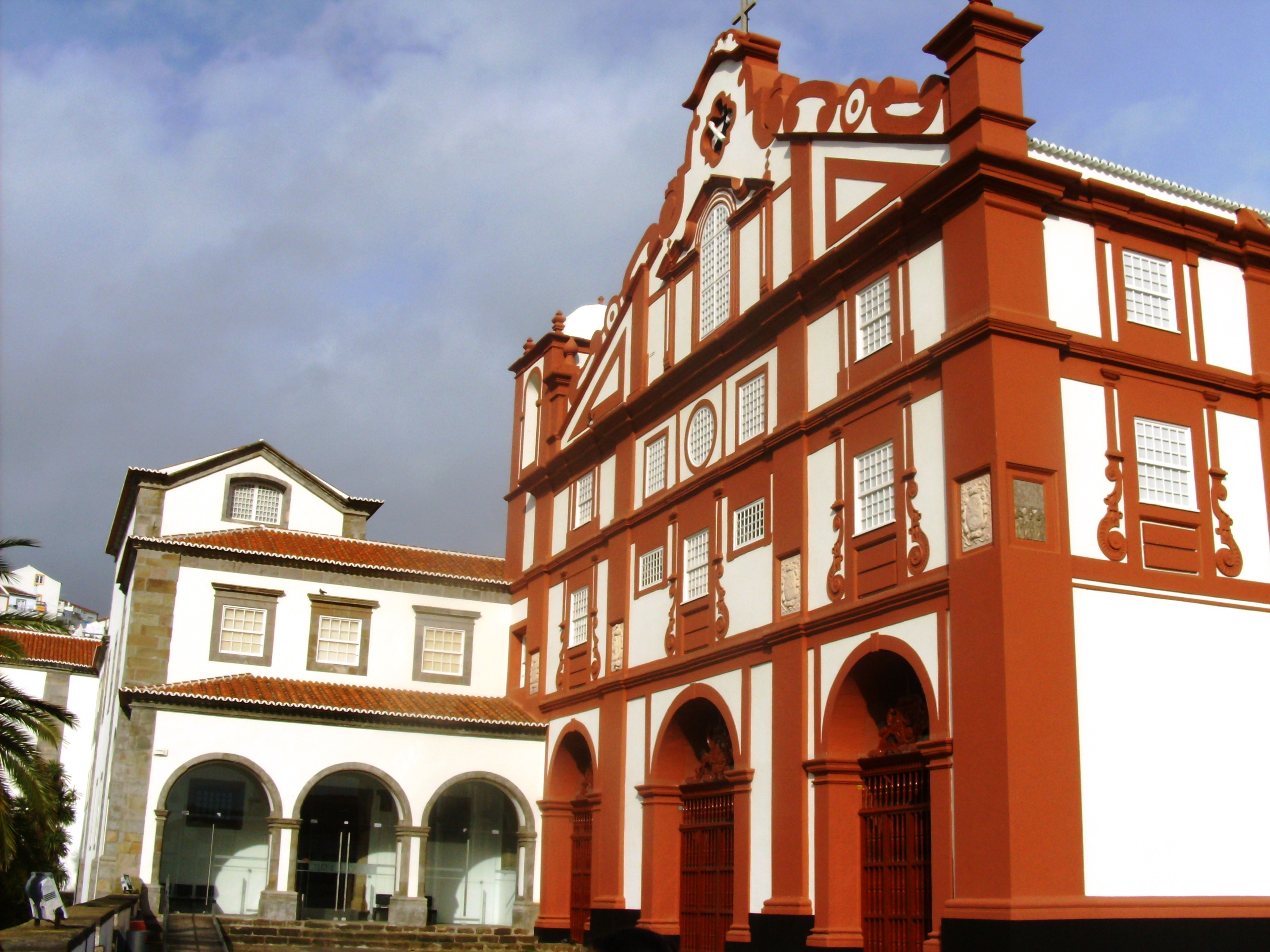 Museu de Angra do Heroísmo, freguesia da Sé, concelho de Angra do Heroísmo, ilha Terceira, Região Autónoma dos Açores, Portugal: em primeiro plano a Igreja de Nossa Senhora da Guia.